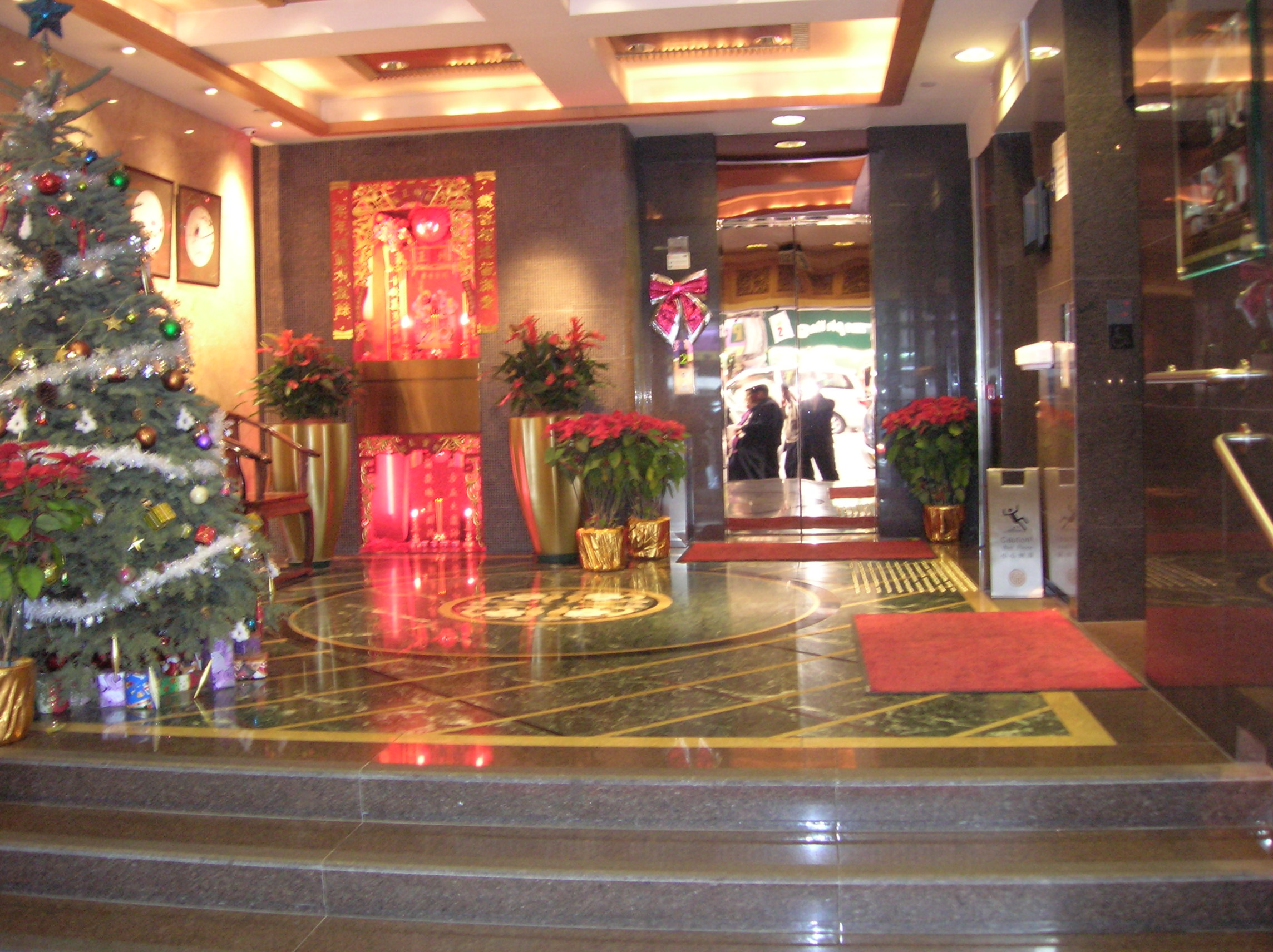 הכניסה למסעדת פוק לאם מון